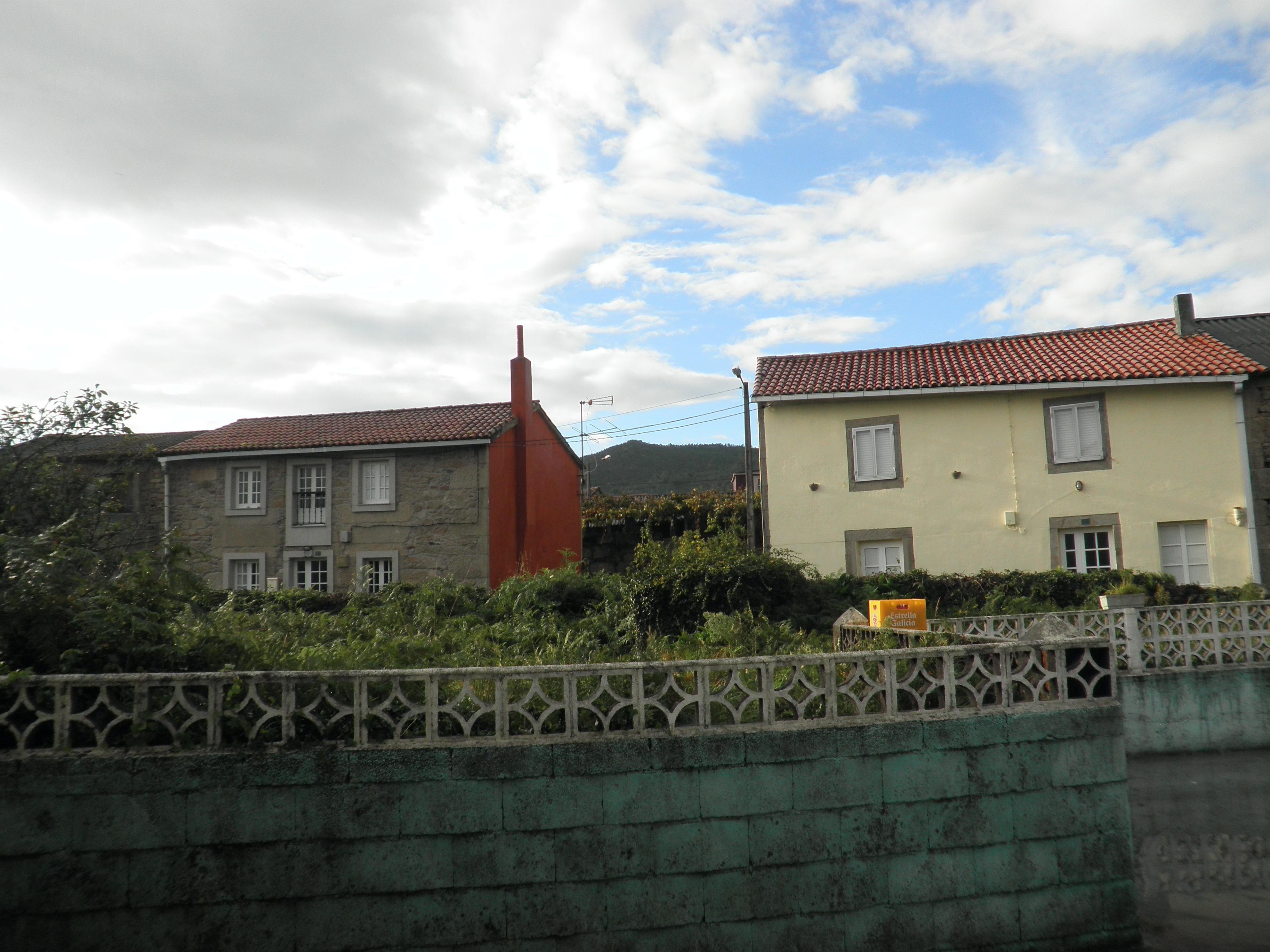 Teaio (Dodro) no outono de 2014.